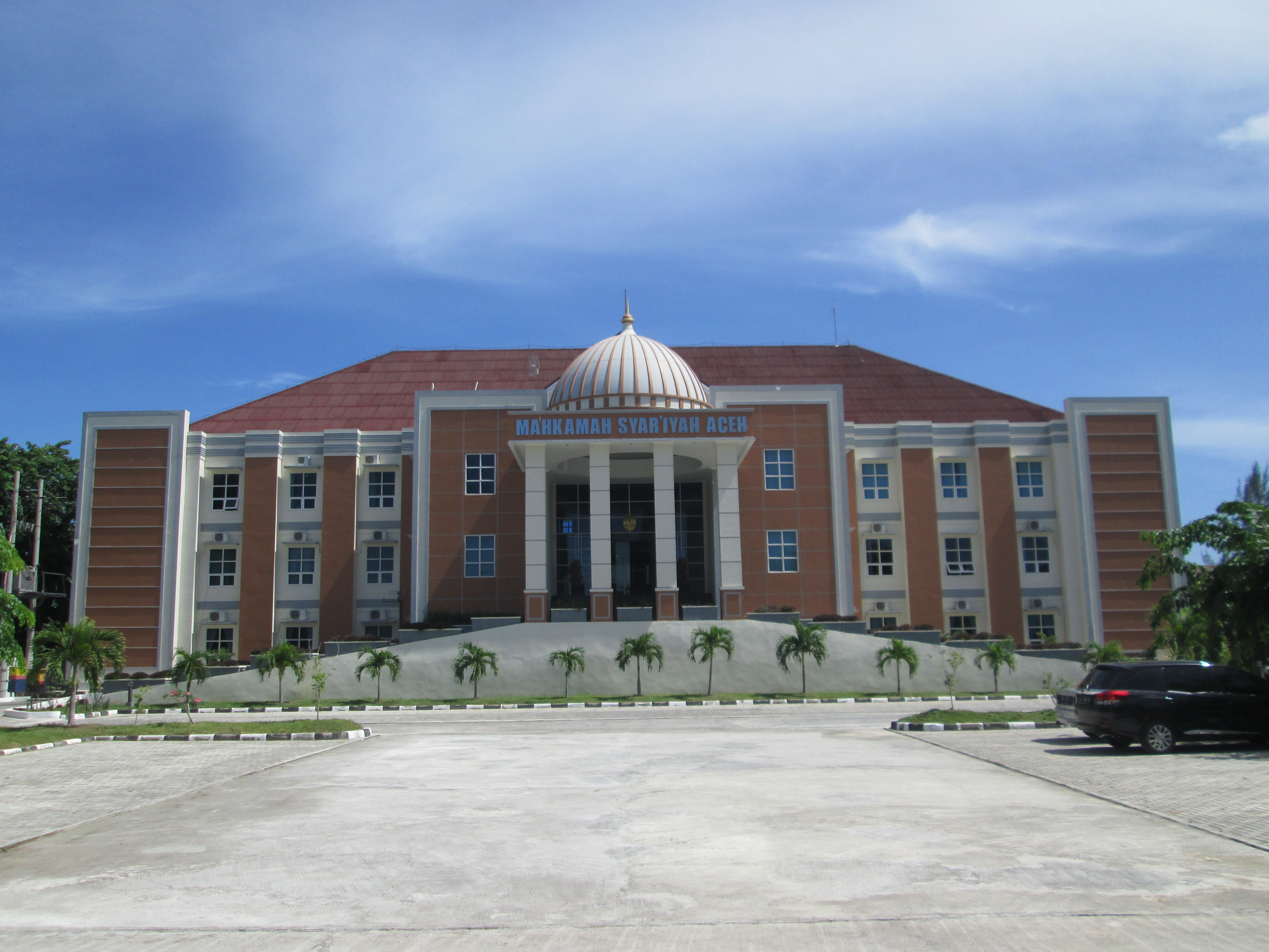 Mahkamah Syar'iyyah Aceh